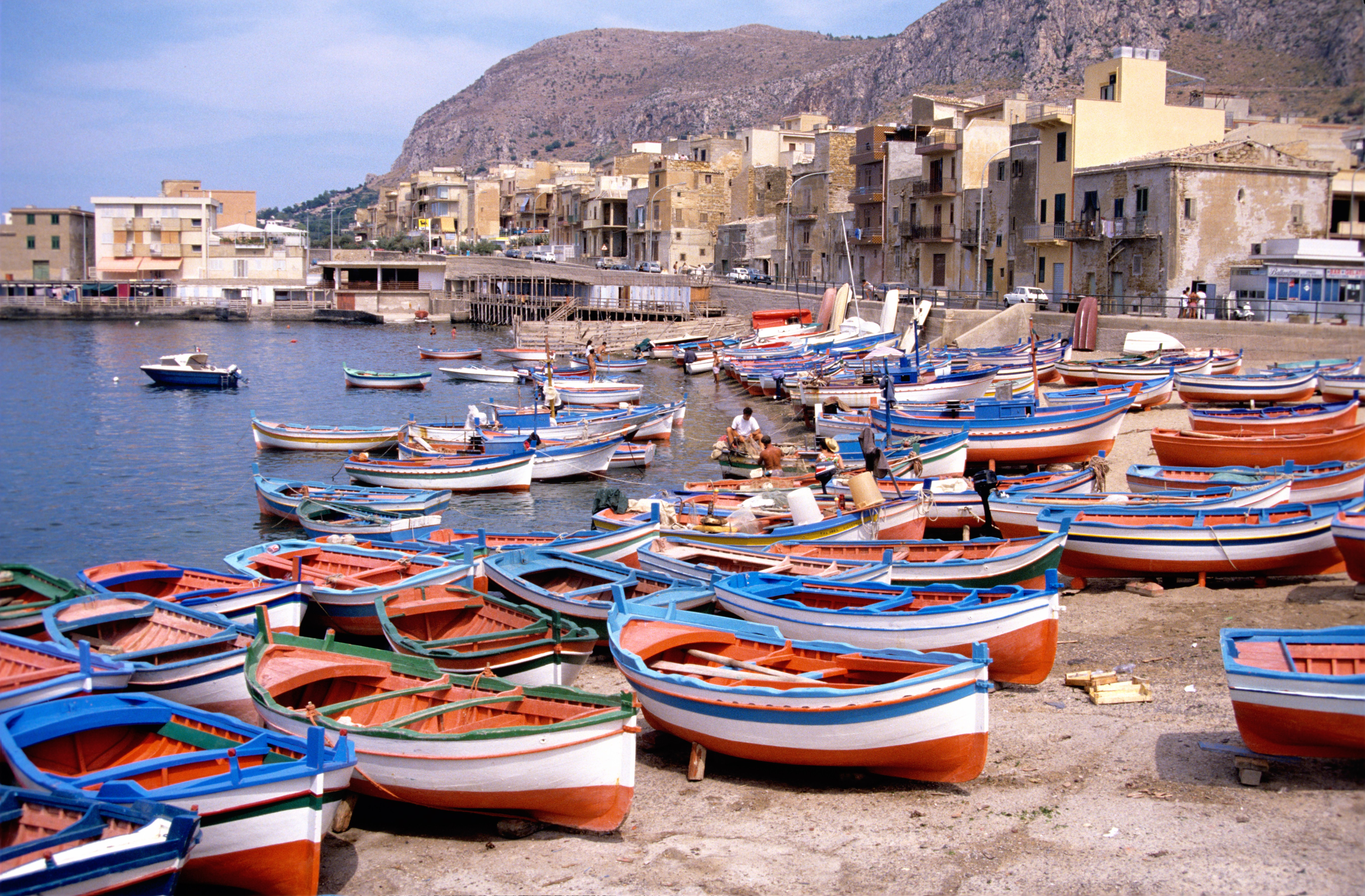 De nombreuses barques de pêche très colorées sur la plage du village d' Aspra. Aspra est un village (ancien village) de pêcheurs situé près de Bagheria, à une quinzaine de kilomètres à l' est de Palerme. Aspra, Sicile, Italie.